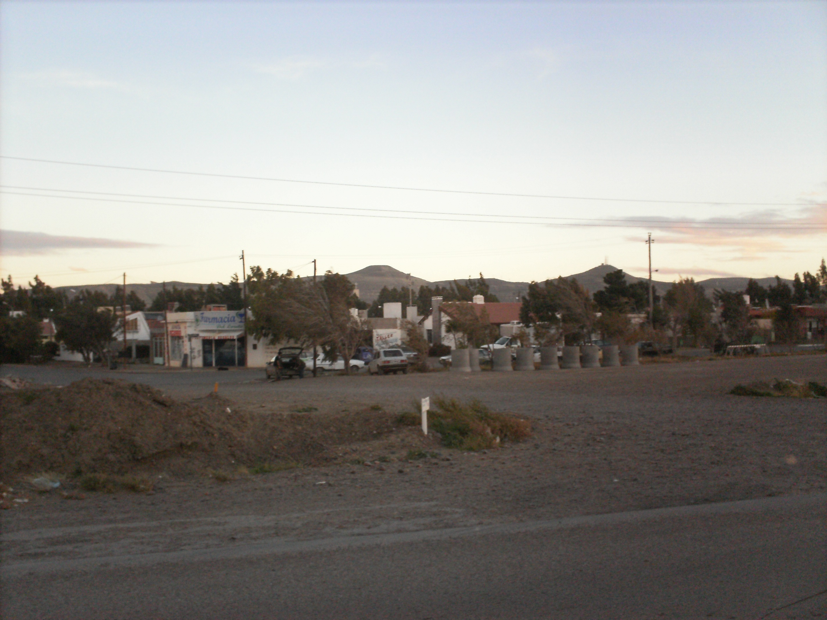 el barrio ciudadela desde la ruta